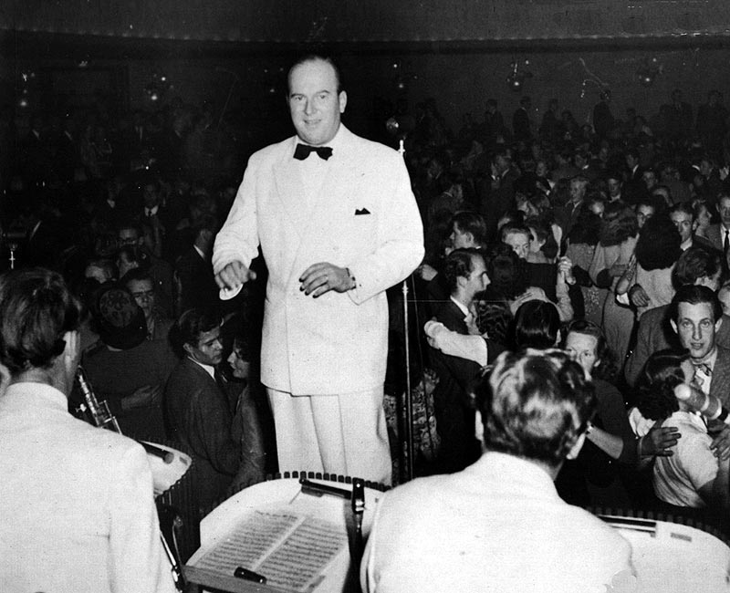 Lulle Ellboj